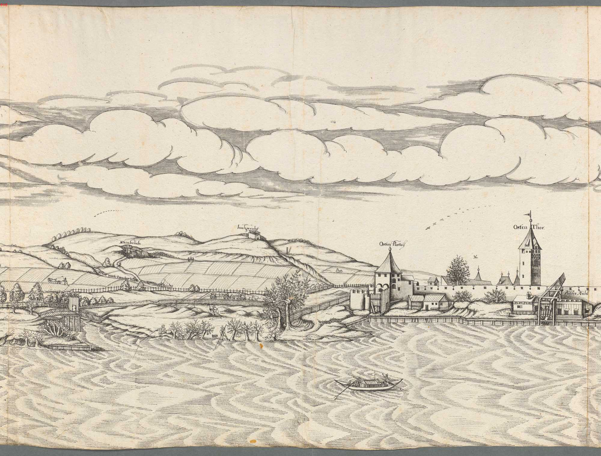 Abriß der Stadt Regensburg östlich und westlich der Steinernen Brücke. Bezeichnungen: Strass nach Landshut, Steinbruch, Hochgericht, Osten-Pastei, Osten Thor, Pulver Mühl. Ostentor